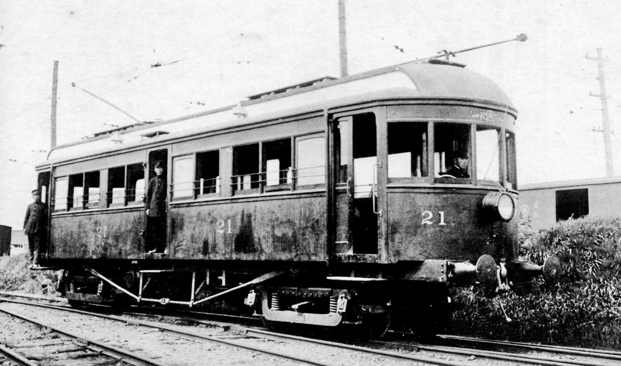 大正期の電車、電3形21号電車